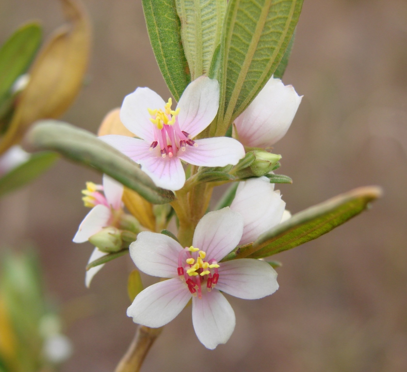 Trembleya parviflora - MELASTOMATACEAE - Parque Nacional de Brasília - Brasília - DF - Brasil